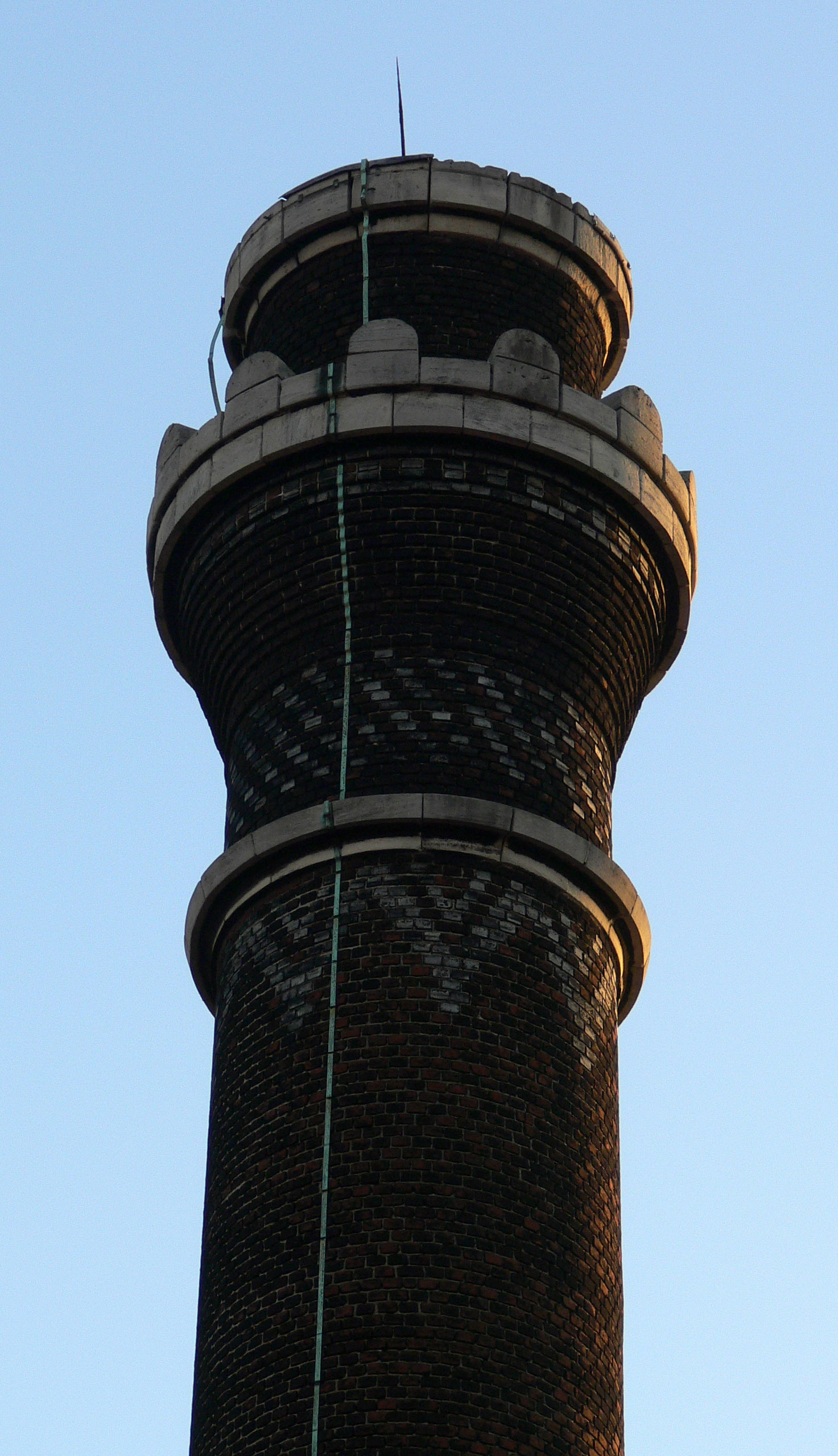 Paratonnerre de l'école des arts et métiers à Lille, dans le nord de la France .